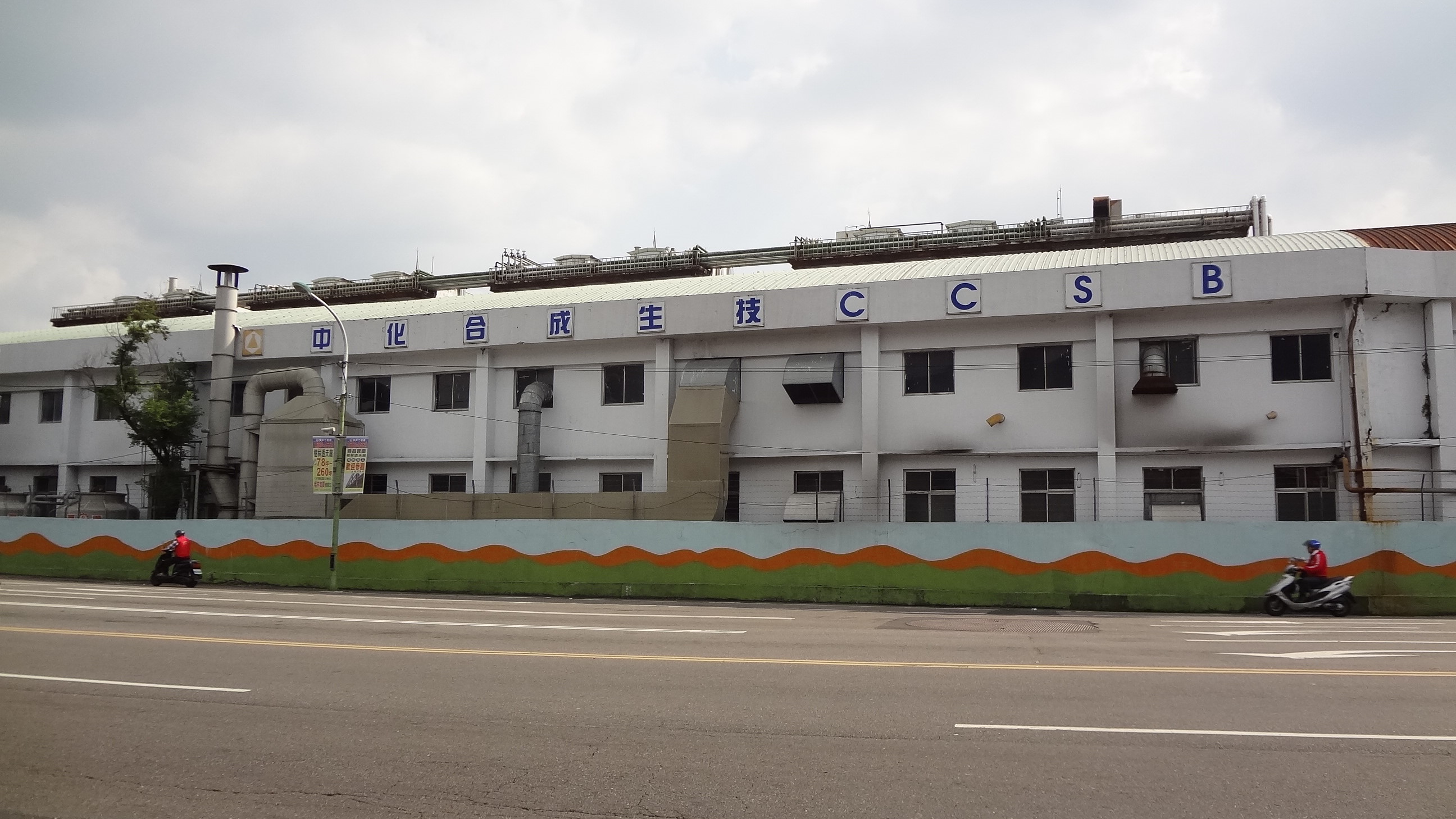 中化合成生技總部，地址：新北市樹林區東興街1號。